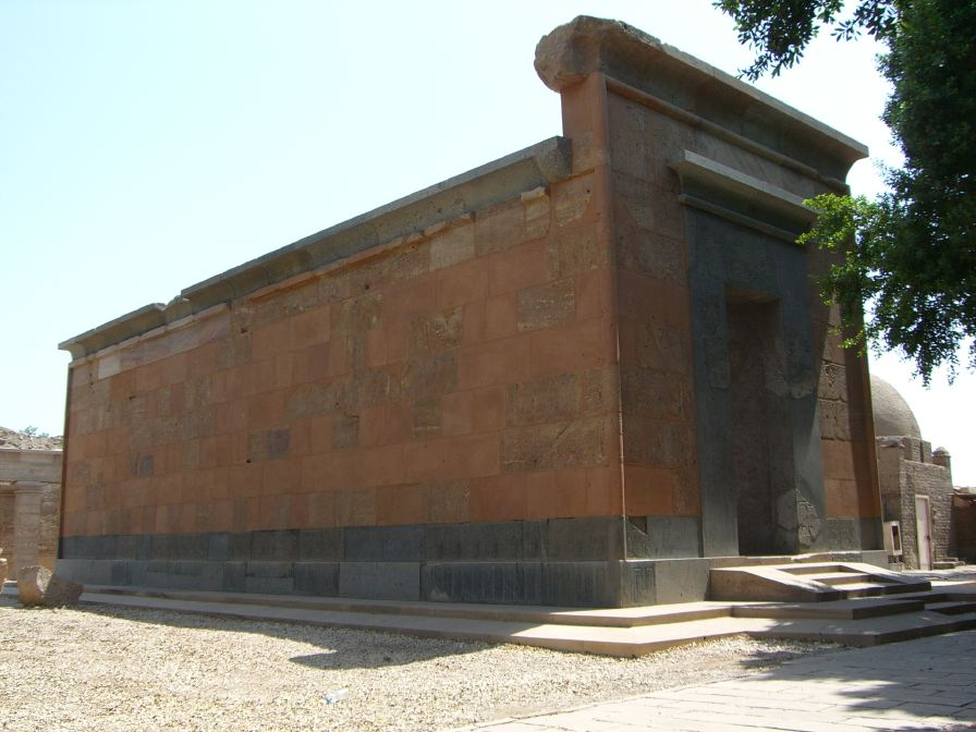 Vue de la "chapelle rouge" d'Hatchepsout à Karnak - XVIIIe dynastie égyptienne